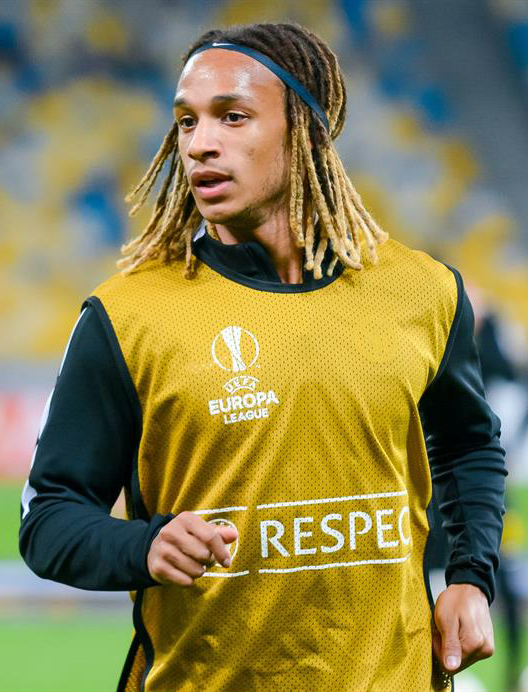 Динамо - Янг Бойз (2:2) фото с матча